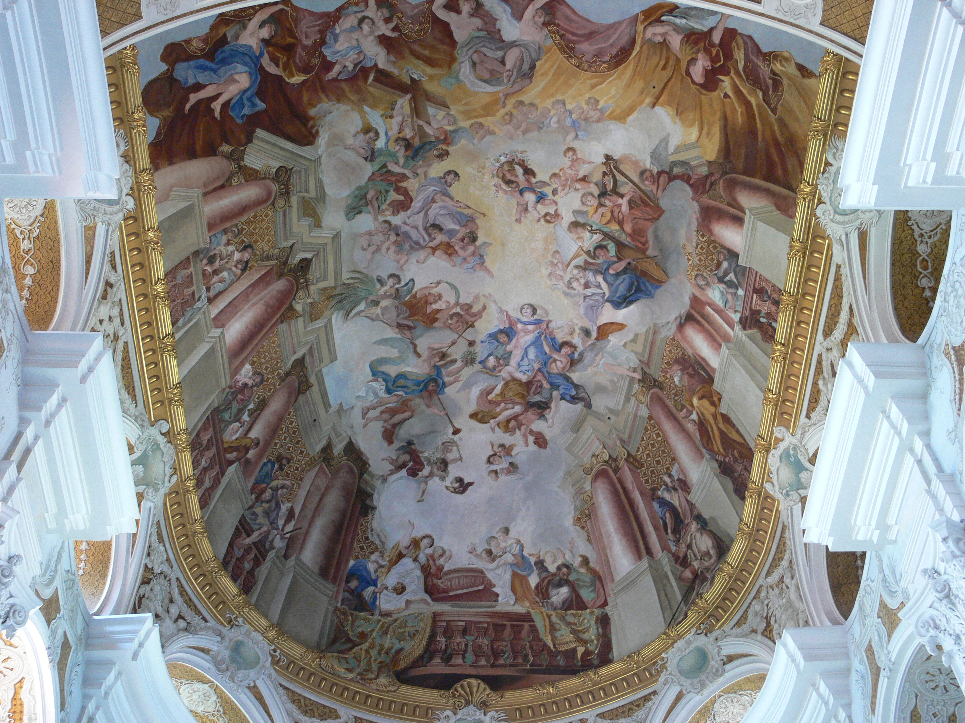 Evangelische Stadtkirche (ehem. Jesuitenkirche), Ellwangen (Jagst) Deckengemälde im Chor: Assumptio (Aufnahme Mariens in den Himmel) von Christoph Thomas Scheffler, 1725–1727